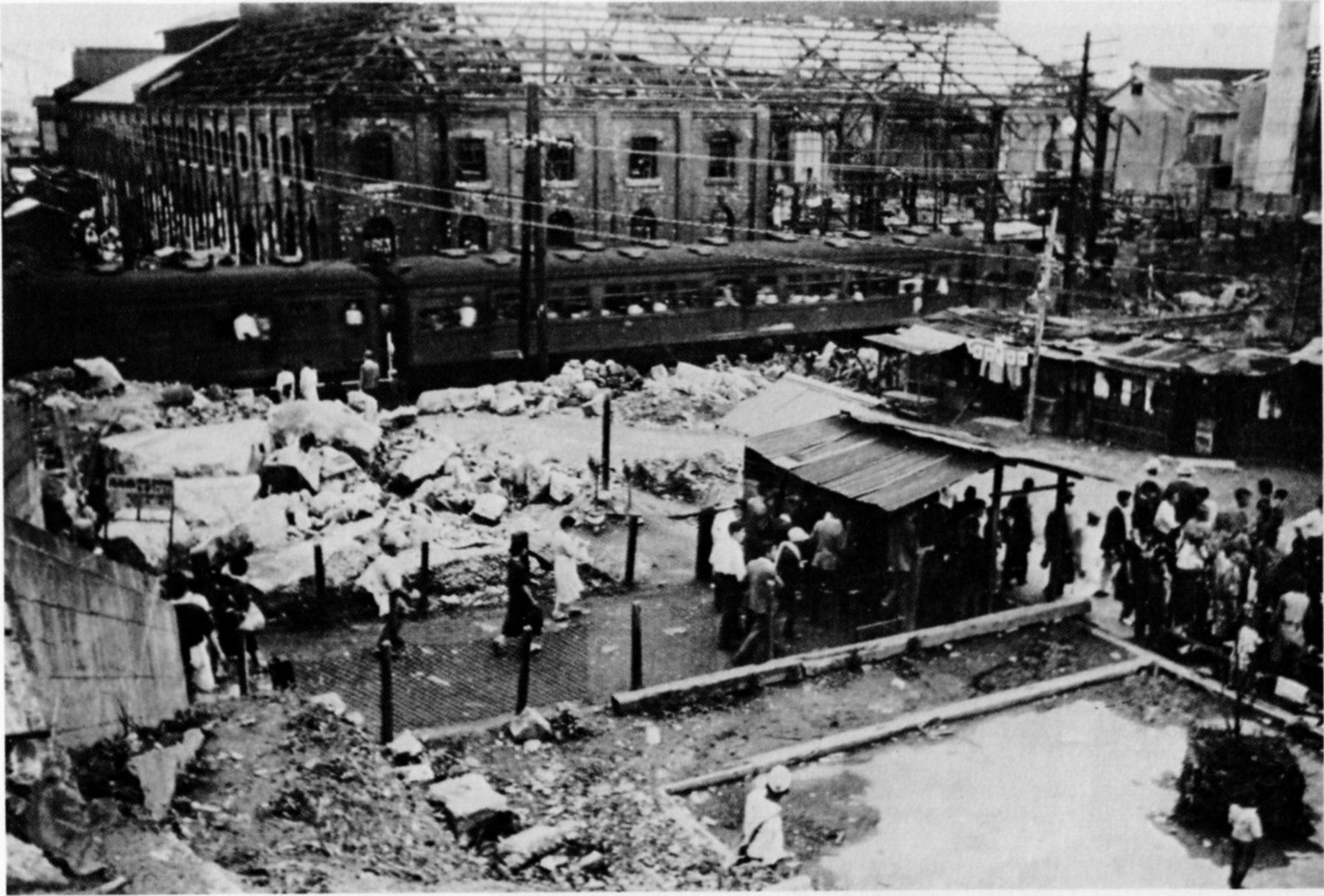 昭和20年(1945年)8月14日の京橋駅空襲から10ヶ月経った京橋駅。この写真は交通科学博物館屋外展示場でも展示されている。